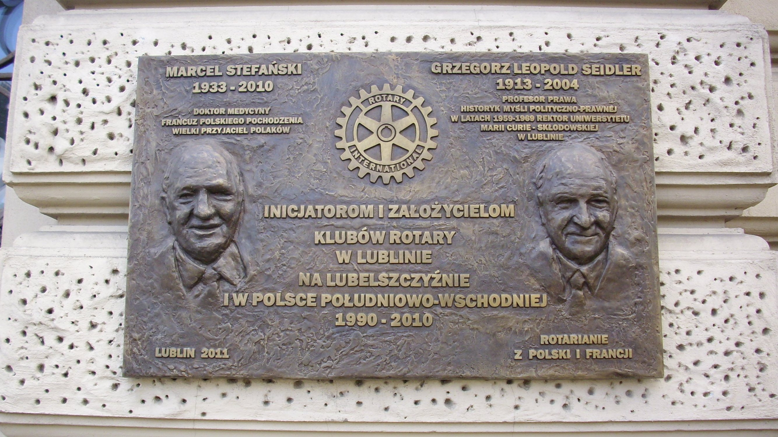 Lublin (Polska), okolice Pl. Litewskiego. Tablica pamiątkowa poświęcona rotarianom – Marcelowi Stefańskiemu i Grzegorzowi Leopoldowi Seidlerowi.